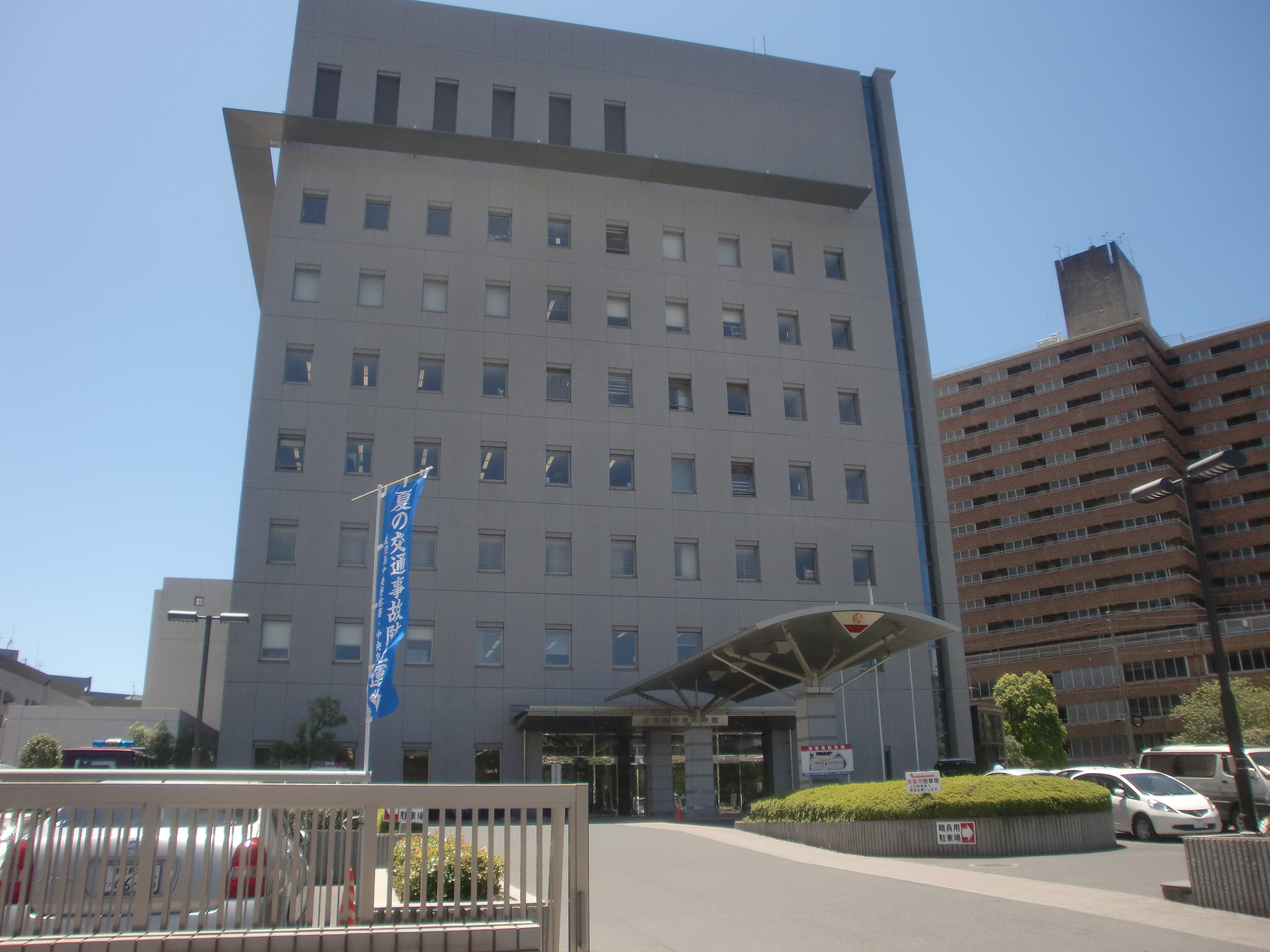 鹿児島中央警察署の外観